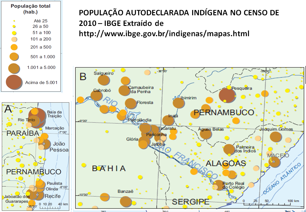 População Autodeclarada Indígena em 2010